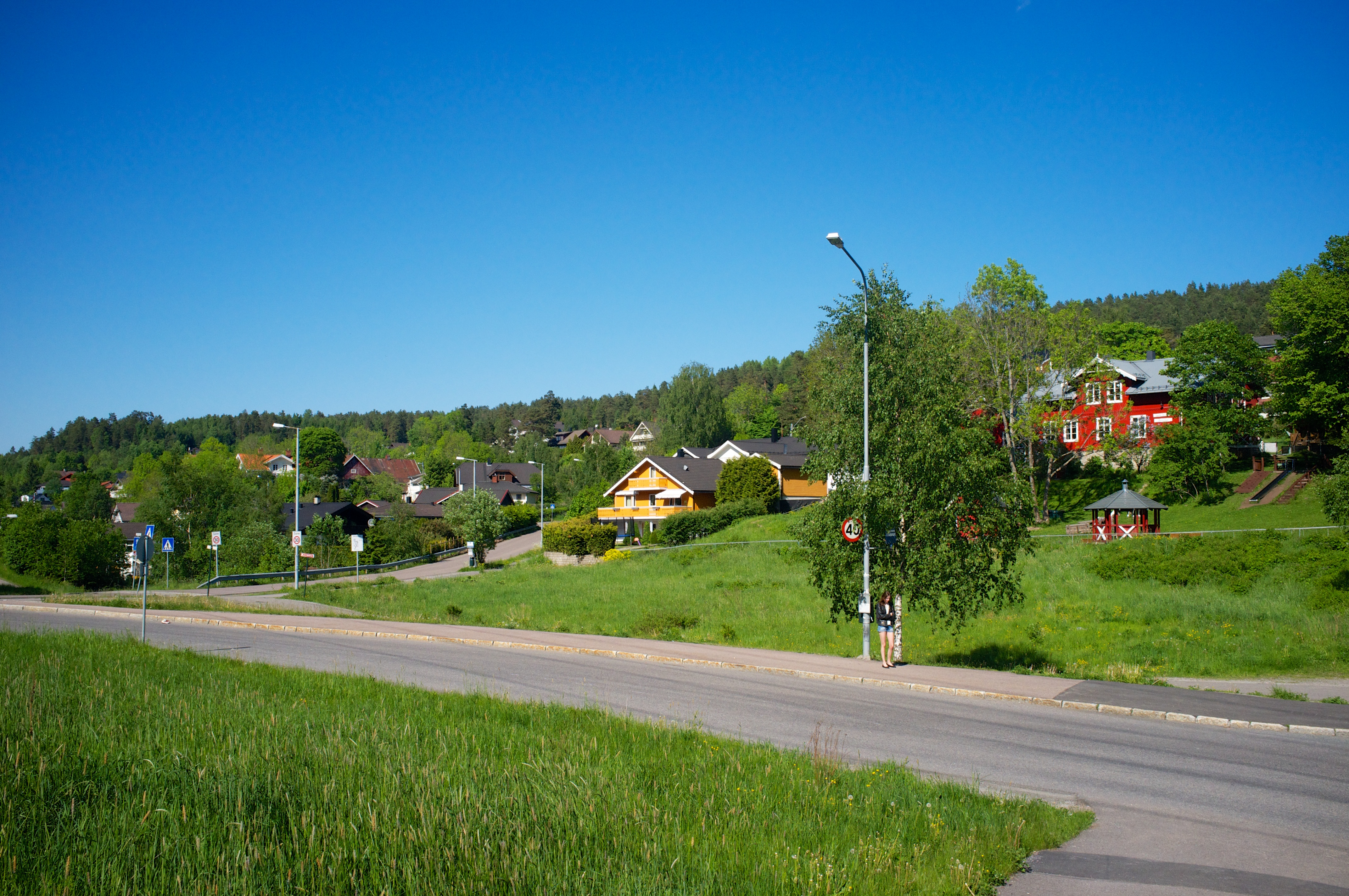 Dal i Oslo.